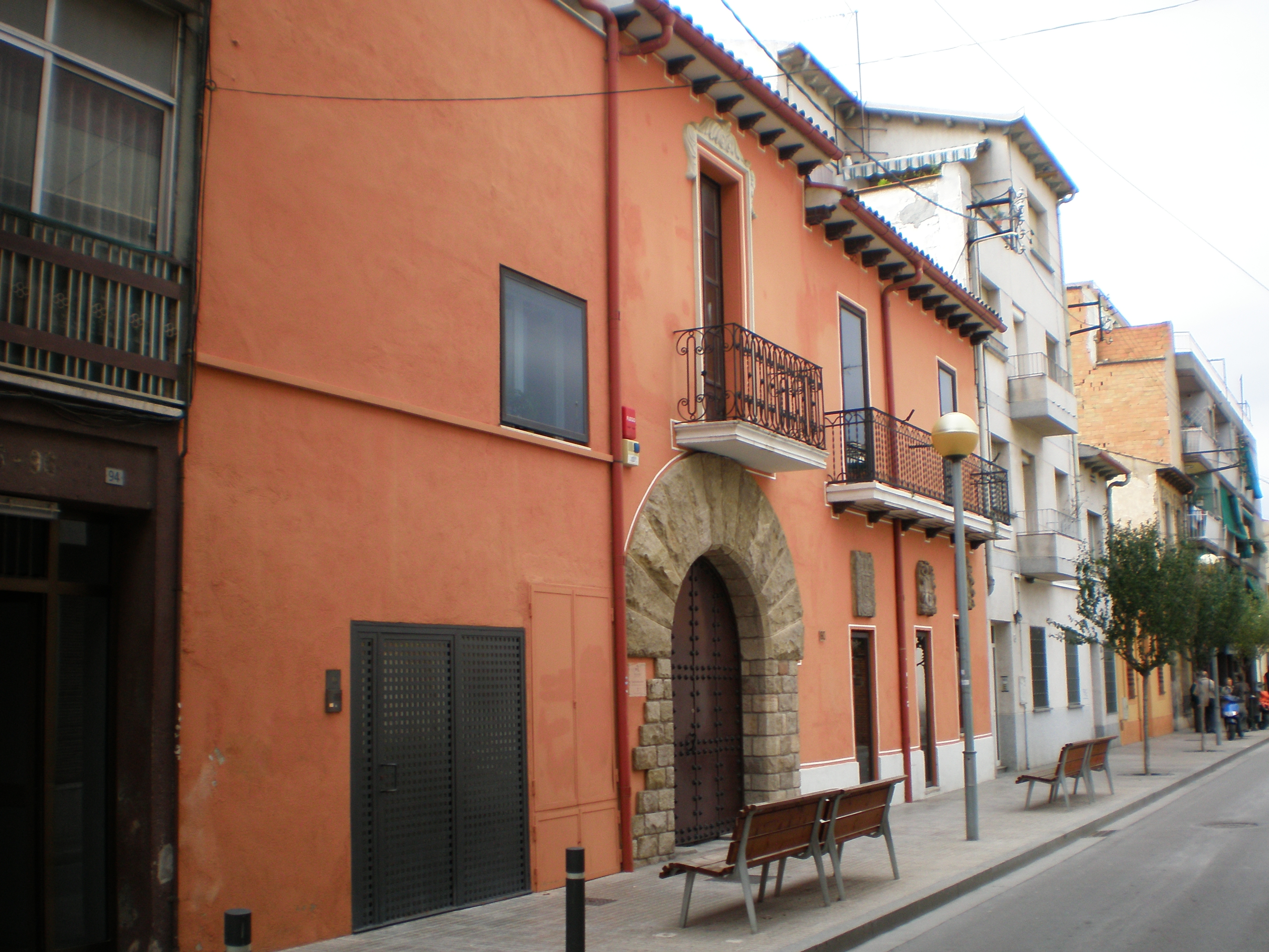 Casa-Museu de Joan Abelló - Mollet del Vallès (Vallès Oriental, província de Barcelona).